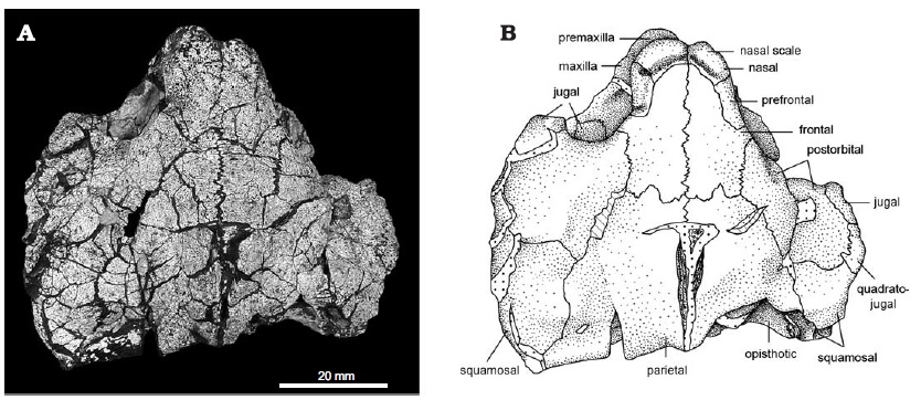 The turtle Kayentachelys aprix Gaffney, Hutchison, Jenkins, and Meeker, 1987, specimen MNA V1558 (also catalogued as MCZ 8913), from the Early Jurassic Kayenta Formation, Gold Springs, Arizona, USA. Skull in dorsal view; photograph (A) and explanatory drawing (B).